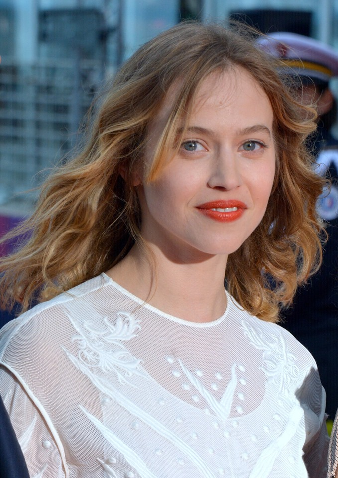 Lou de Laage Cabourg 2019